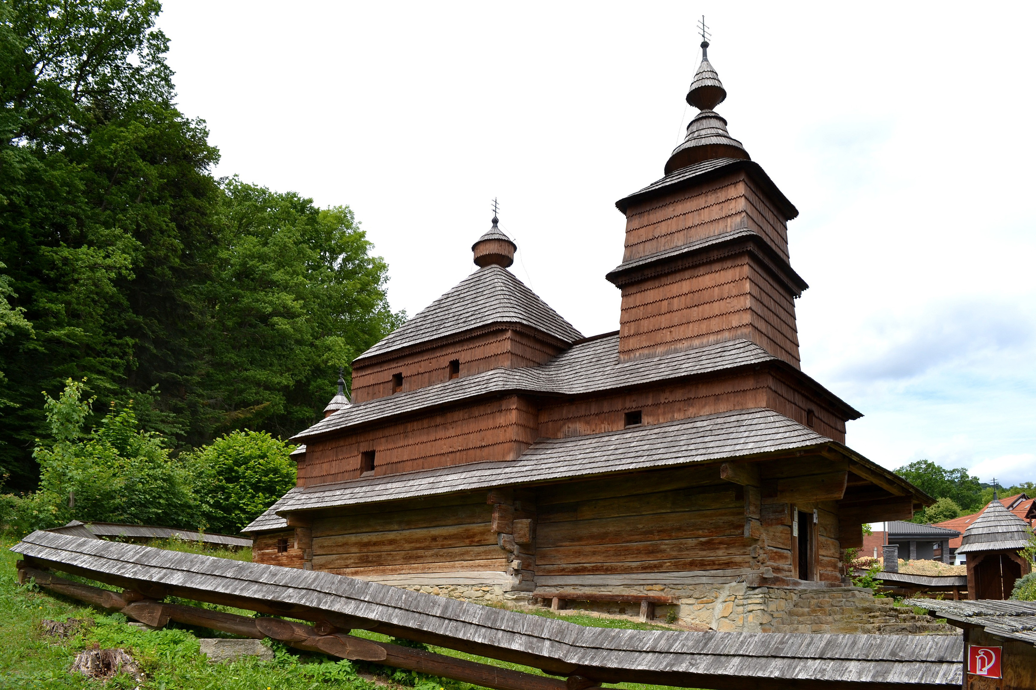 Kostol svätého Mikuláša biskupa zo Zboja (okr. Snina); celkový pohľad